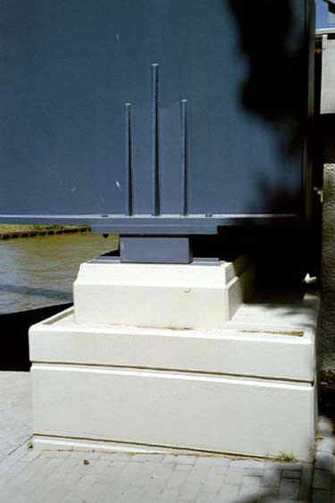 Beschreibung:modernes Elastomerlager an einer Stabbogenbrücke nahe Quelle: Privatfotografie Datum: ca. 2000 Ort: bei Braunschweig Fotograf: Marcus Tschaut (Sungamoipics) Lizenz: Public Domain, GNU Kategorie:Bild:Brücke